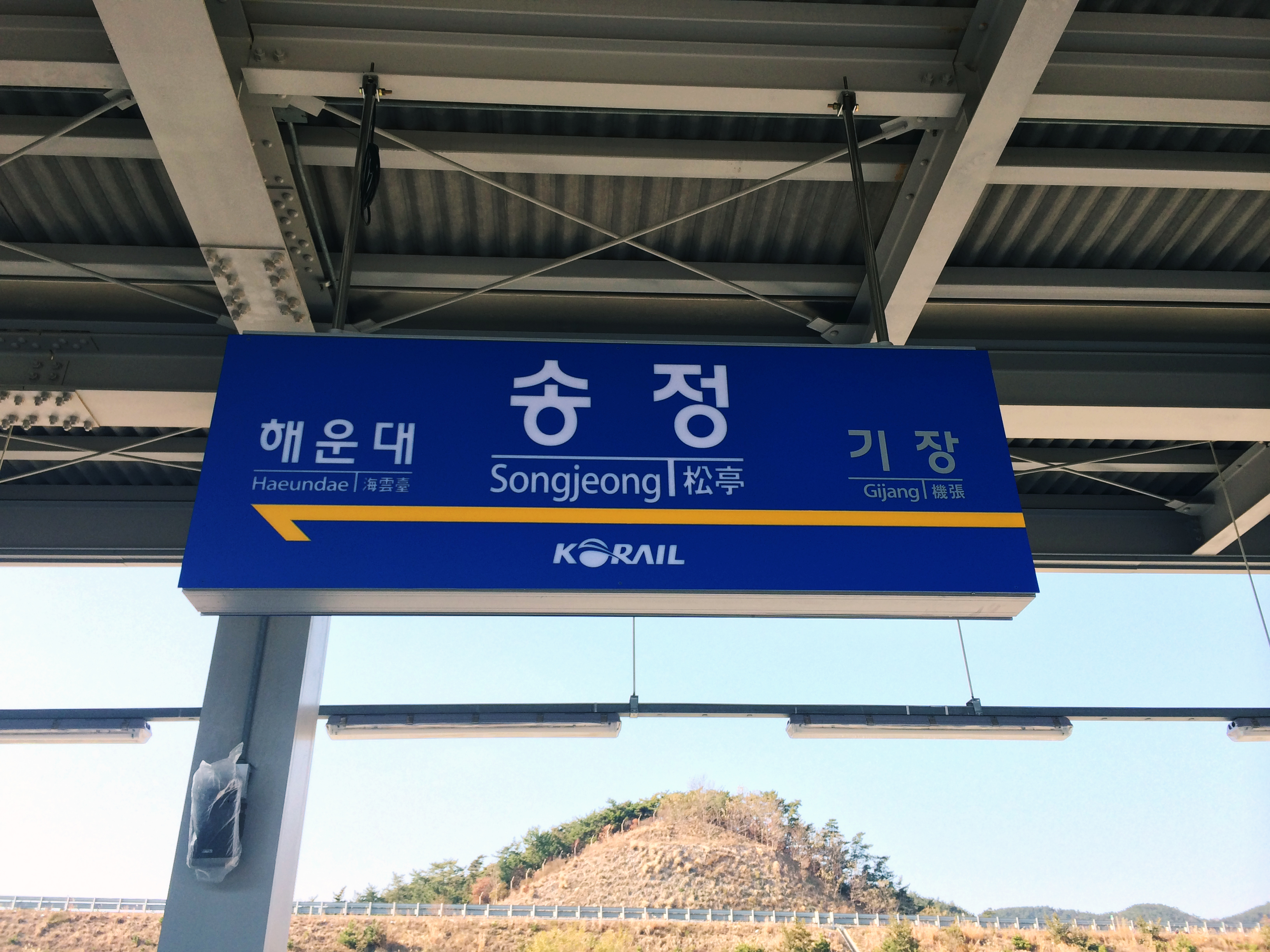 송정역 역명판